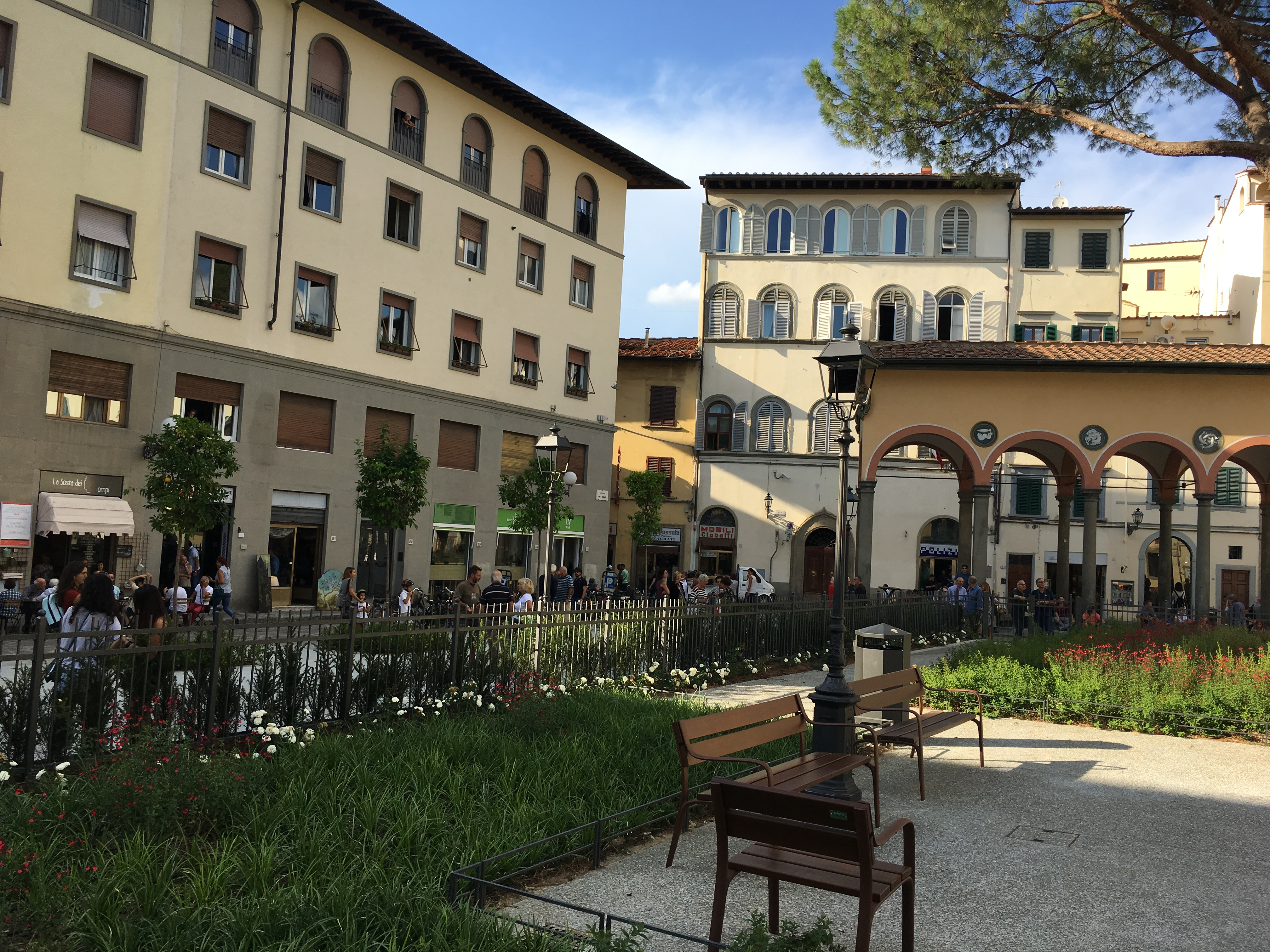 Piazza dei Ciompi. Inaugurazione della piazza riqualificata nel settembre 2018